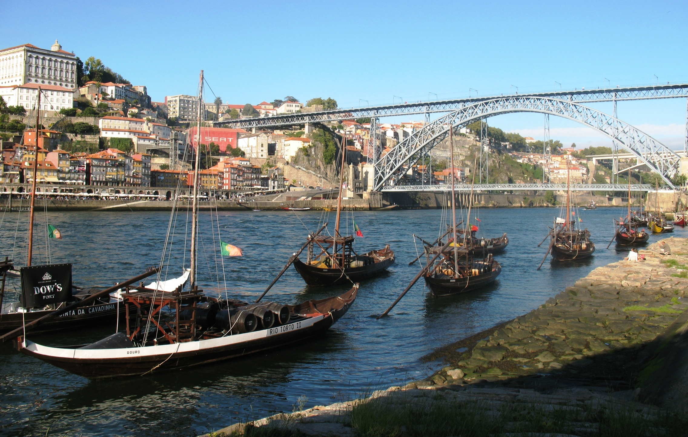 г.Порту, река Дору, мост Понте-де-Дон-Луиш